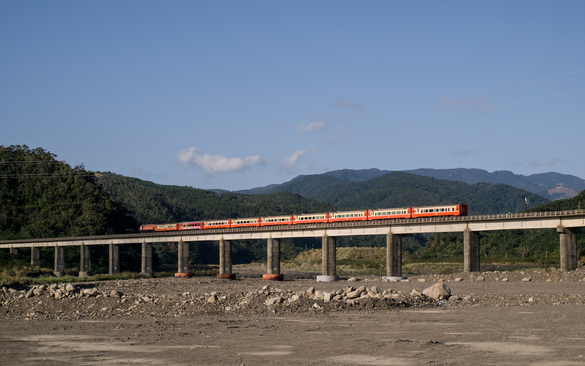 大武溪鐵路橋梁